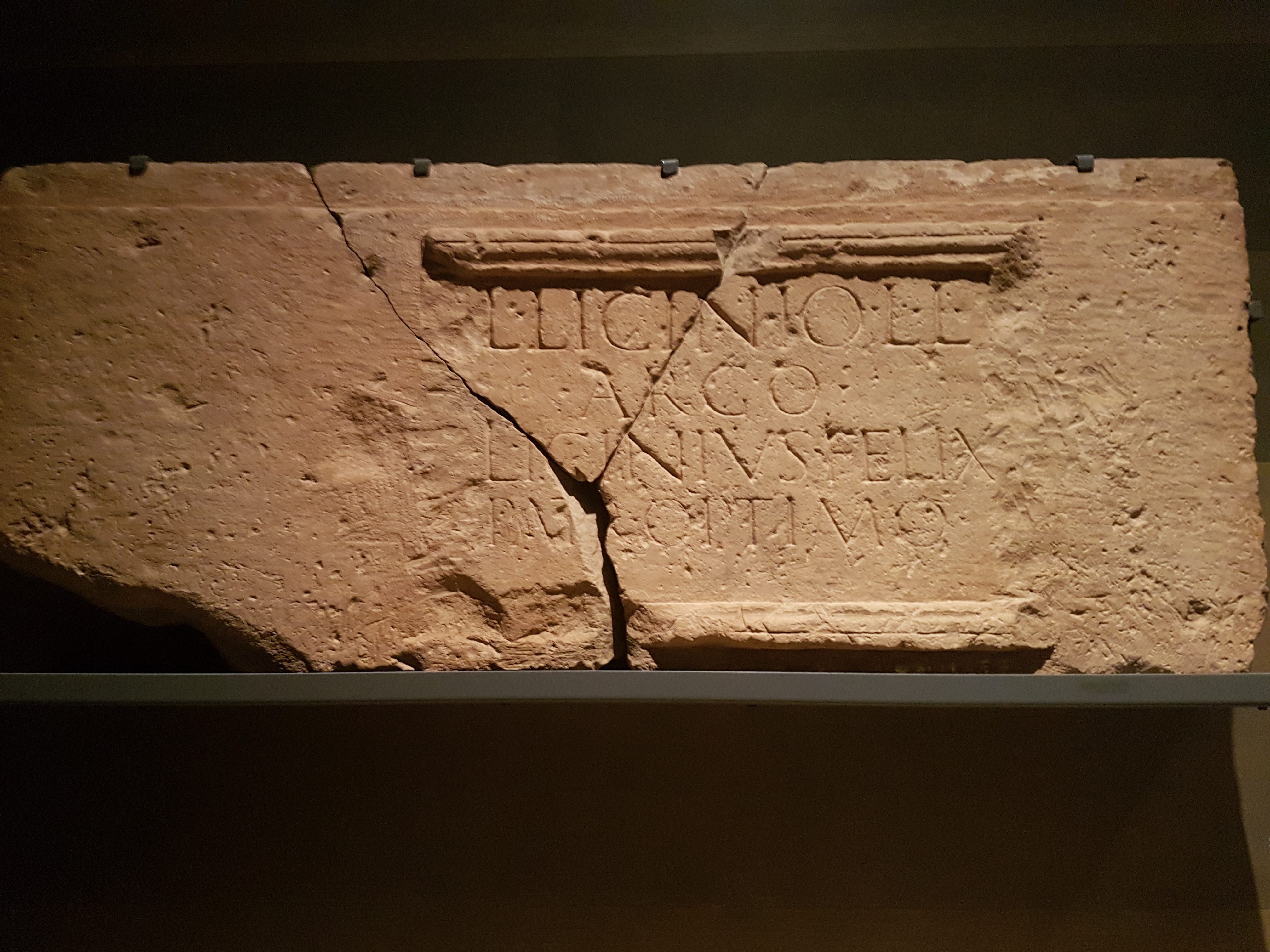 Làpida reutilitzada com a llosa de paviment a la basílica del Bovalar